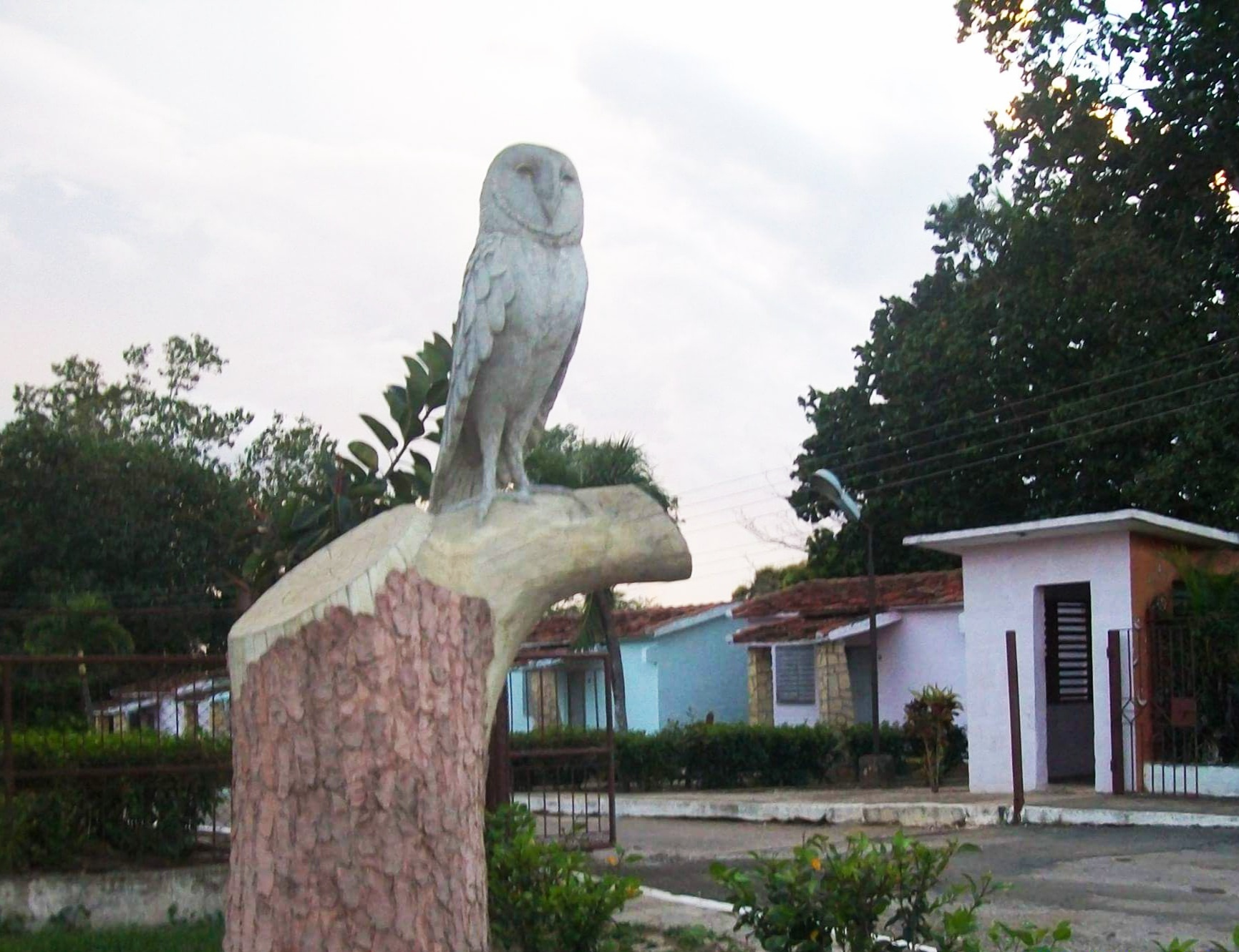 Lechuza rodas